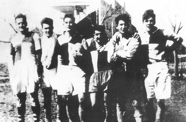 Ernesto Guevara (primero desde la derecha) con integrantes del equipo de rugby Yporá Rugby Club. ca.1947